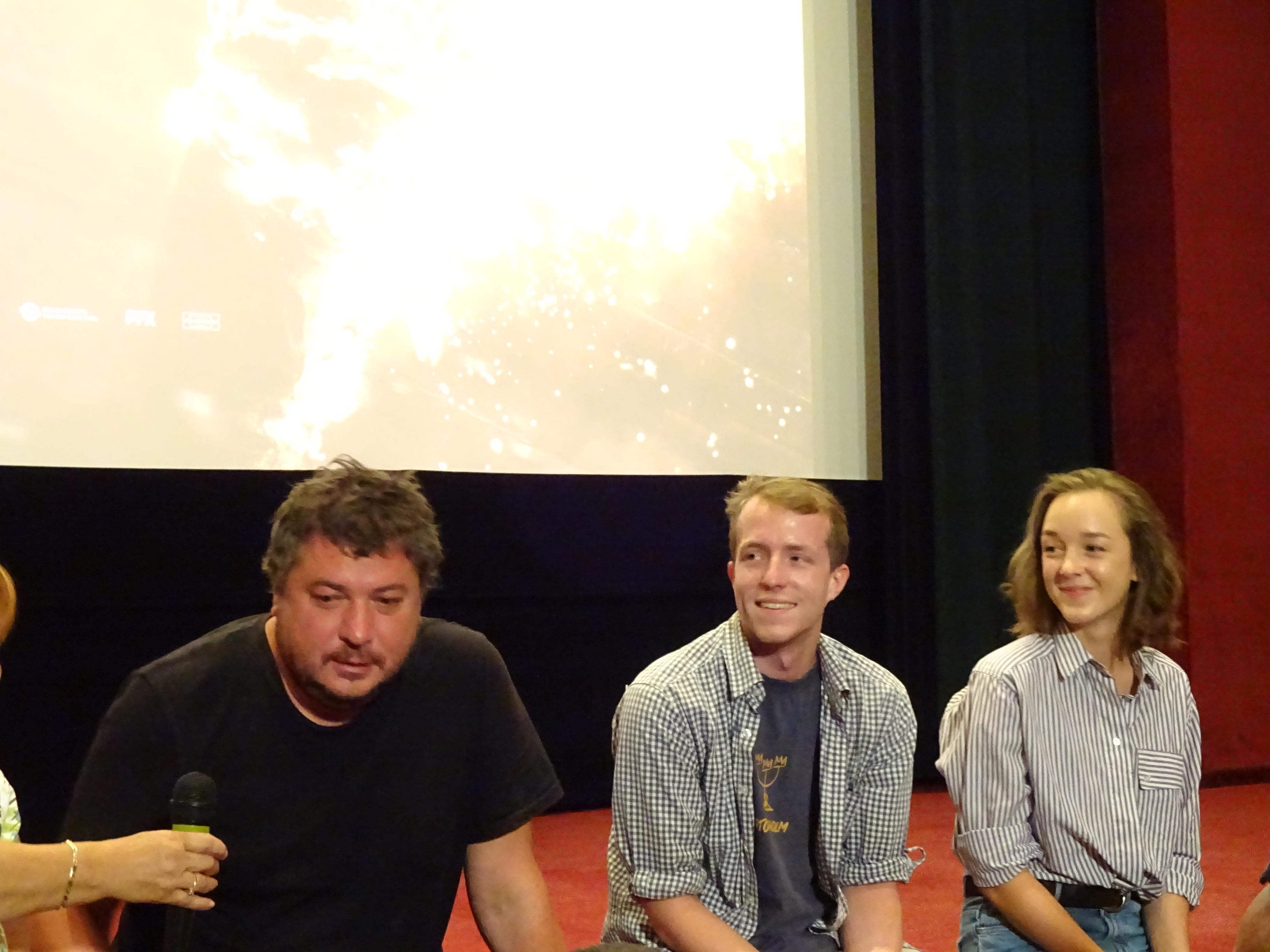 Novinářská konference 9. 8. 2018. Autor: Lucie Borová (Emma Orphe) pro Kritiky.cz